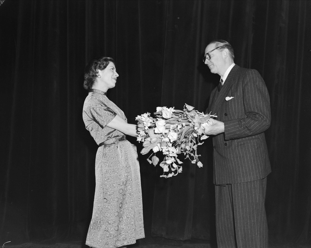 Rønnaug Alten mottar blomster under premieren på filmen Kranes konditori.